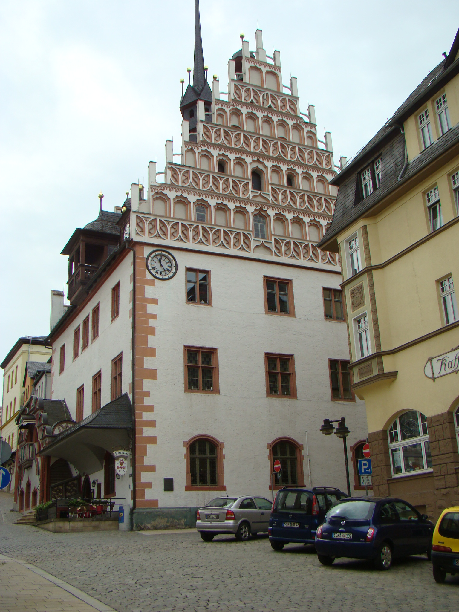 Pößneck